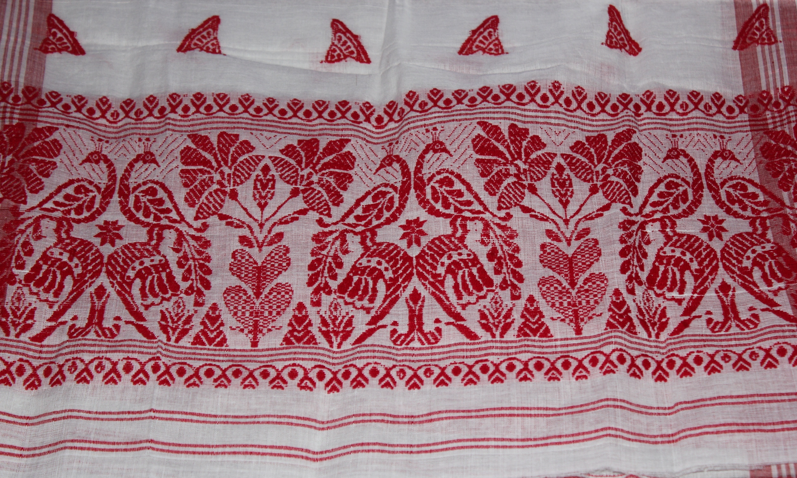 অসমীয়া: পৰম্পৰাগত অসমীয়া ফুলাম গামোচা।